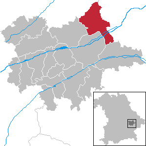 Wallersdorf in Bavaria - District Dingolfing-Landau